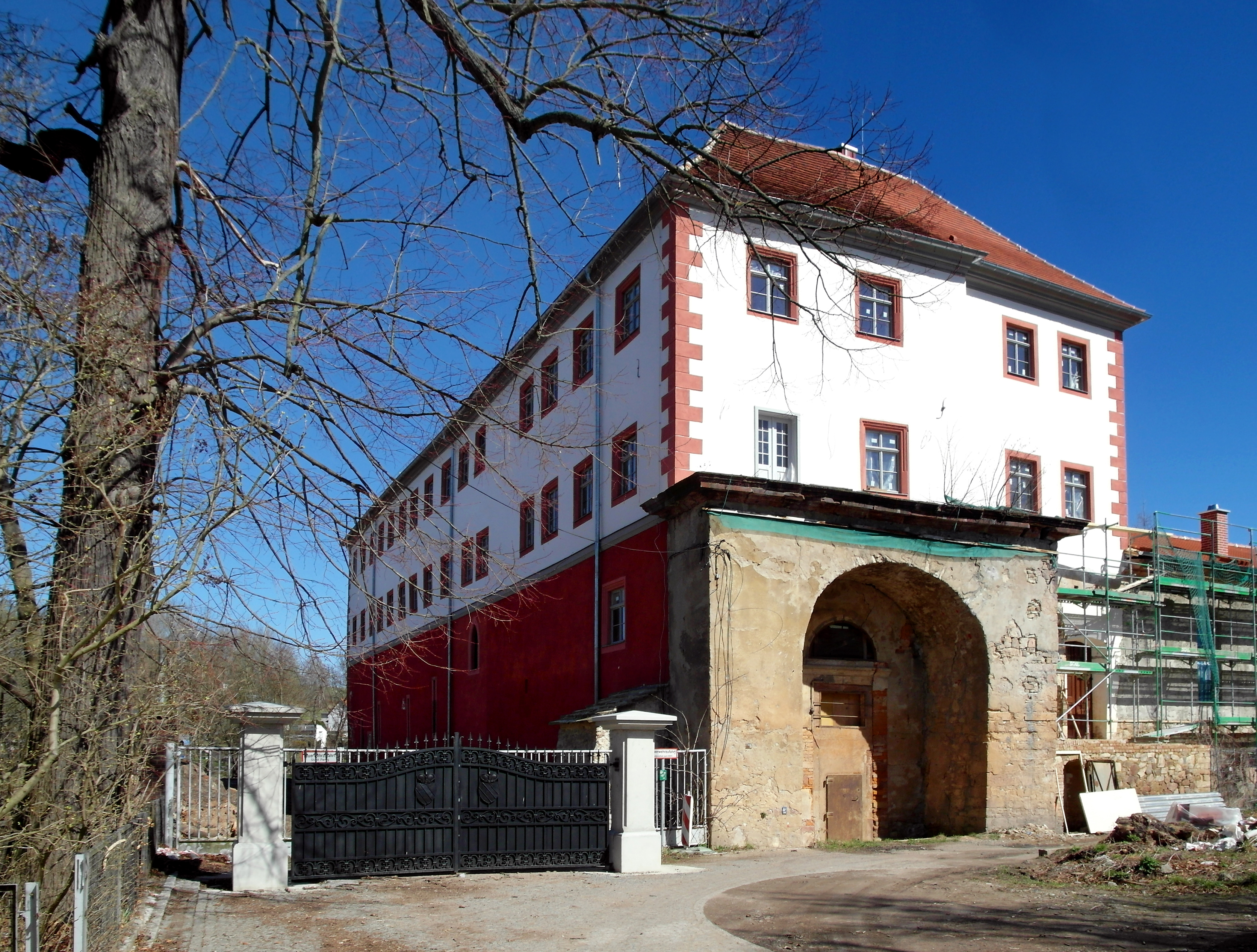 06.04.2018 09322 Penig: Altes Schloß, Mühlgraben 18 (GMP: 50.935220,12.707269) am Ufer der Zwickauer Mulde. Es ist aus der mittelalterlichen Burg der Burggrafen von Altenburg und Leisnig hervorgegangen, die im 14. Jahrhundert nachgewiesen ist. Das heutige Alte Schloß Schloß stammt wohl aus dem 17. Jahrhundert. 1889 verkaufte Carl Graf von Schönburg-Forderglauchau Altes und Neues Schloß an die Peniger Papierfabrik. Im Alten Schloss wurden Wohnungen eingerichtet. Nach langem Leerstand wurde das Alte Schloss 2012 von der Stadt Penig an den Prinzen Alfred von Schönburg-Hartenstein verkauft. Nach der Sanierung sollen im Schloß Wohn- und Empfangsräume, Gästezimmer und die Verwaltung der eigenen Forstflächen um Rochsburg und Penig untergebracht werden. Sicht von Südwesten. [SAM5036.JPG]20180406465DR.JPG(c)Blobelt